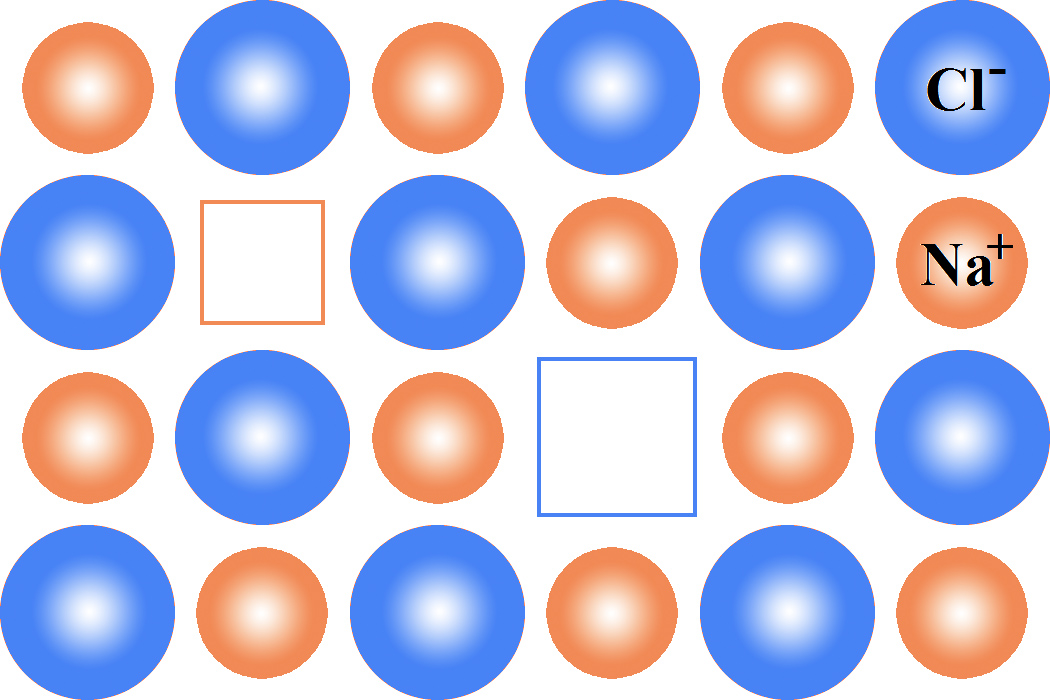 Дефект по Шоттки в кристалле NaCl